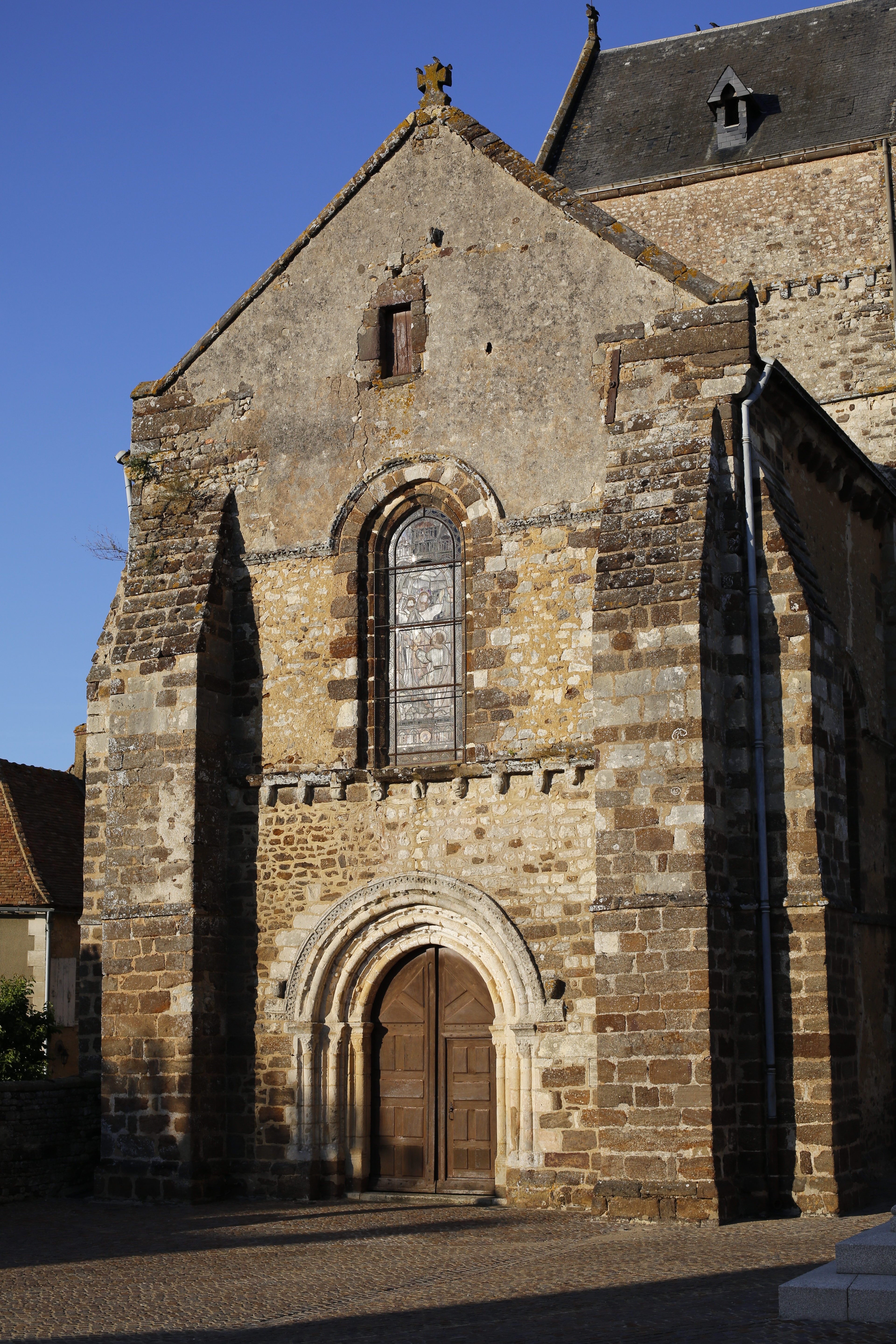 Église Notre-Dame de Ségrie. .